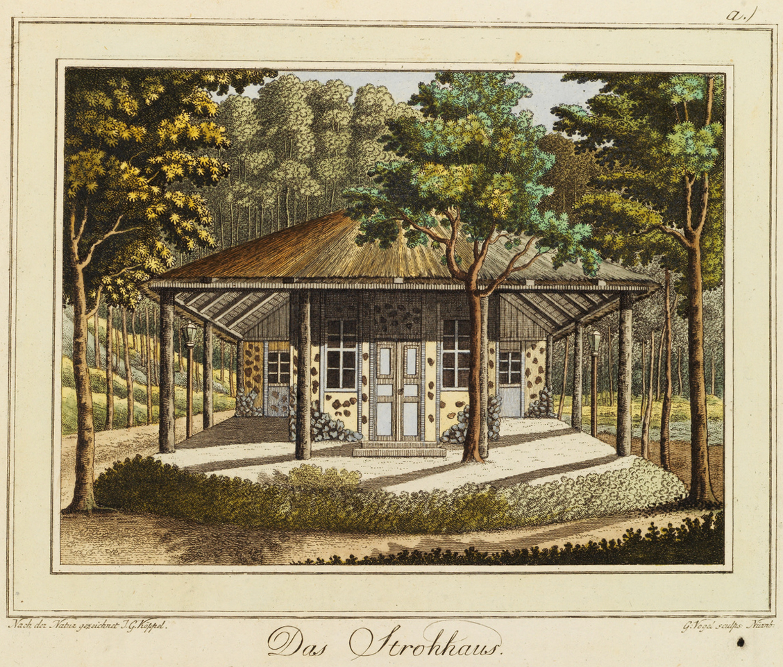 Von G. Vogel gestochene Zeichnung von Johann Gottfried Köppel aus dem Buch Die Eremitage zu Sanspareil. Nach der Natur gezeichnet und beschrieben von Johann Gottfried Köppel. Kais. Landgerichts-Registrator zu Anspach. Erlangen. Verlegt von Wolfgang Walther. 1793.